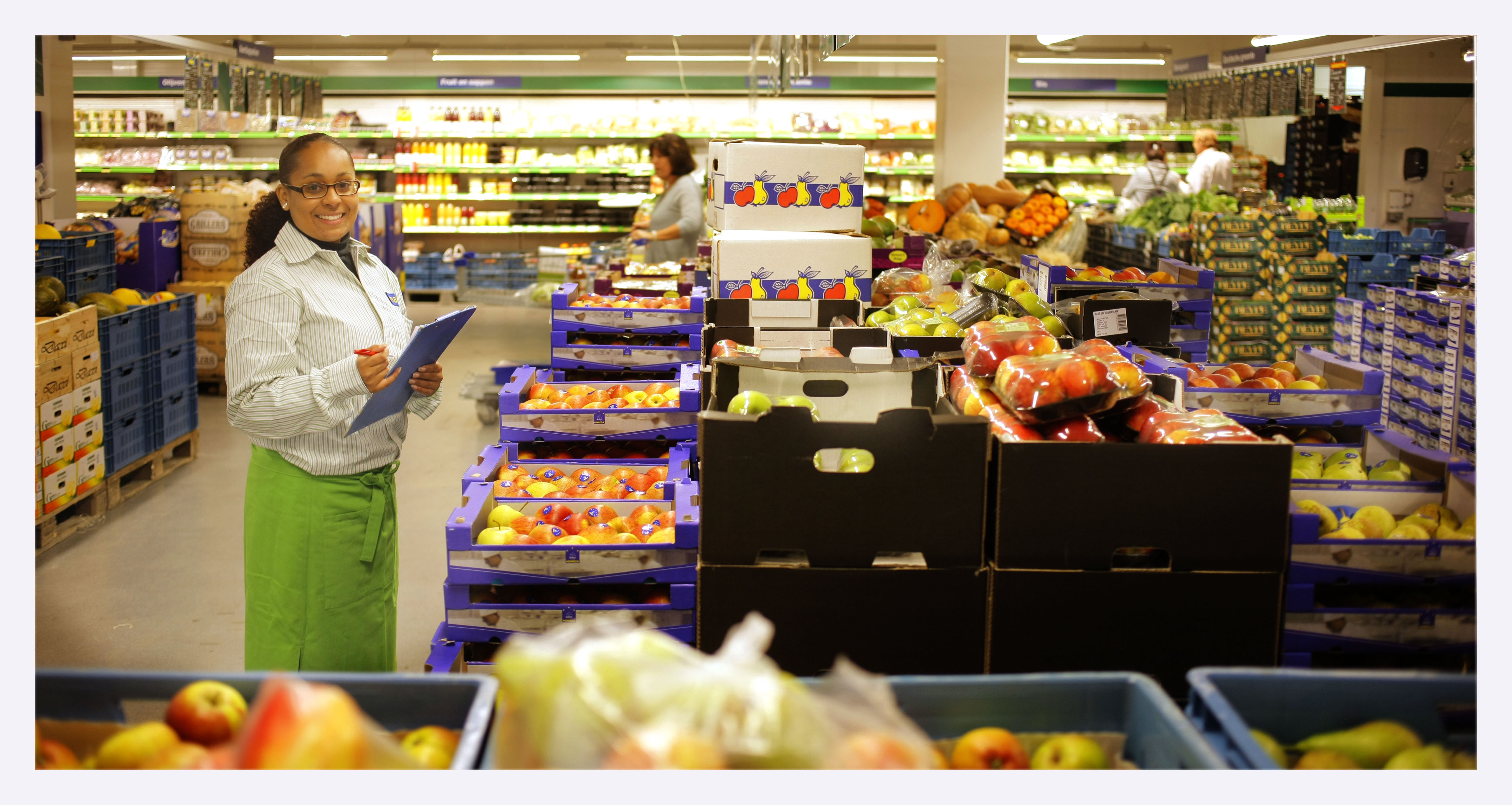 Groente- en fruit-afdeling Makro Amsterdam. Klanten worden geholpen door vakspecialisten